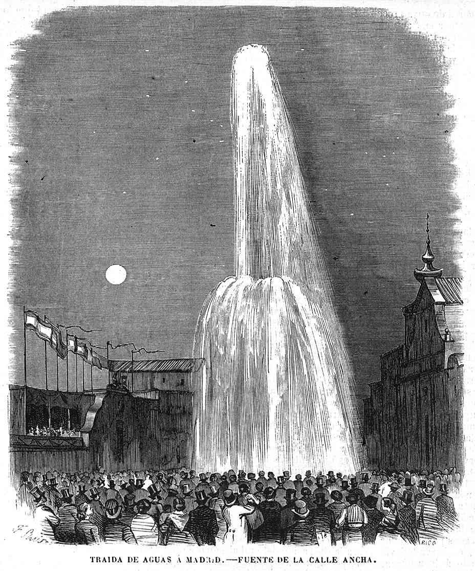 Traída de aguas a Madrid, fuente de la Calle Ancha, en la revista española El Museo Universal.